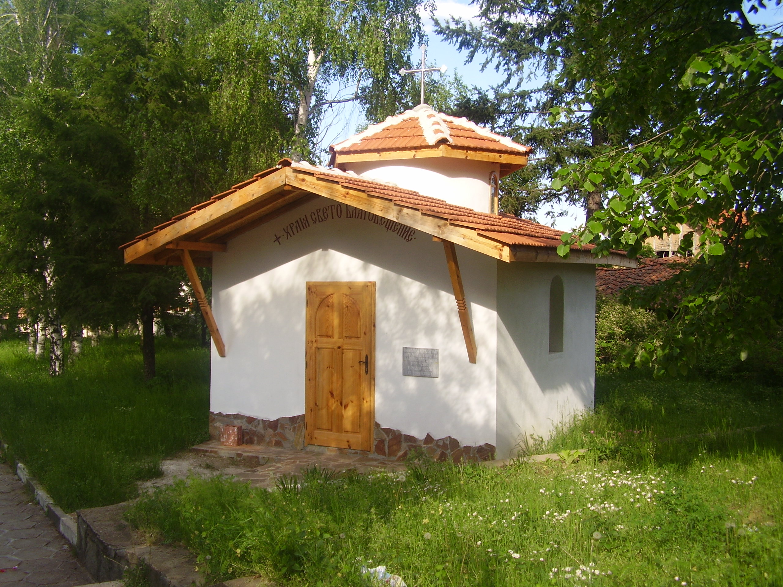 с.Соволяно - Параклис "Свето Благовещение"